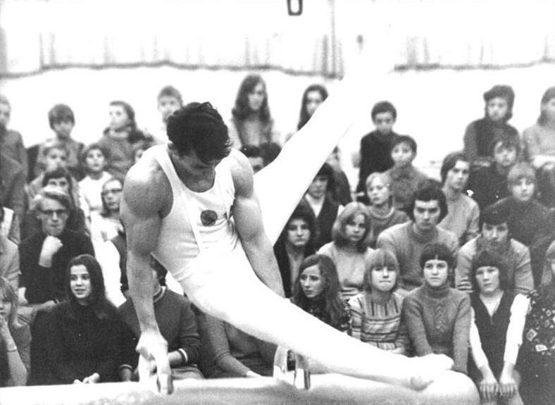 ADN-ZB-Liebers-28.11.71 Gera: Turn-Länderkampf der Männer, DDR gegen Koreanische Volksdemokratische Republik 542,55 zu 539,45 Punkten In der Einzelwertung des Zwölfkampfes erkämpfte sich Reck-Europameister Klaus Köste (DDR), hier am Seitpferd, mit 110,50 Punkten den ersten Platz